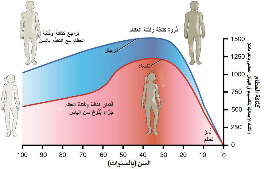 رسمٌ بياني يُظهر وُصول كثافة العظم عند الإنسان إلى أعلى مُستوياتها عند سن الثلاثين، ثُمَّ تتراجع بعد ذلك. وعند النساء تتراجع بسُرعةٍ أكبر من تراجُعها عند الرجال.